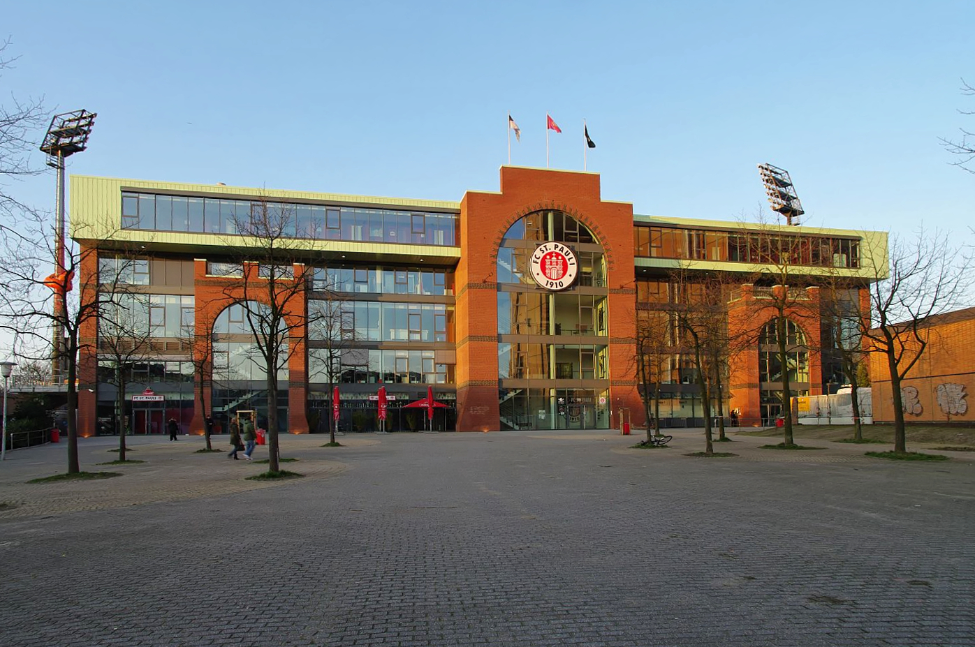 Millerntor-Stadion Hamburg, Fassade der Südkurve von der Budapester Straße aus.